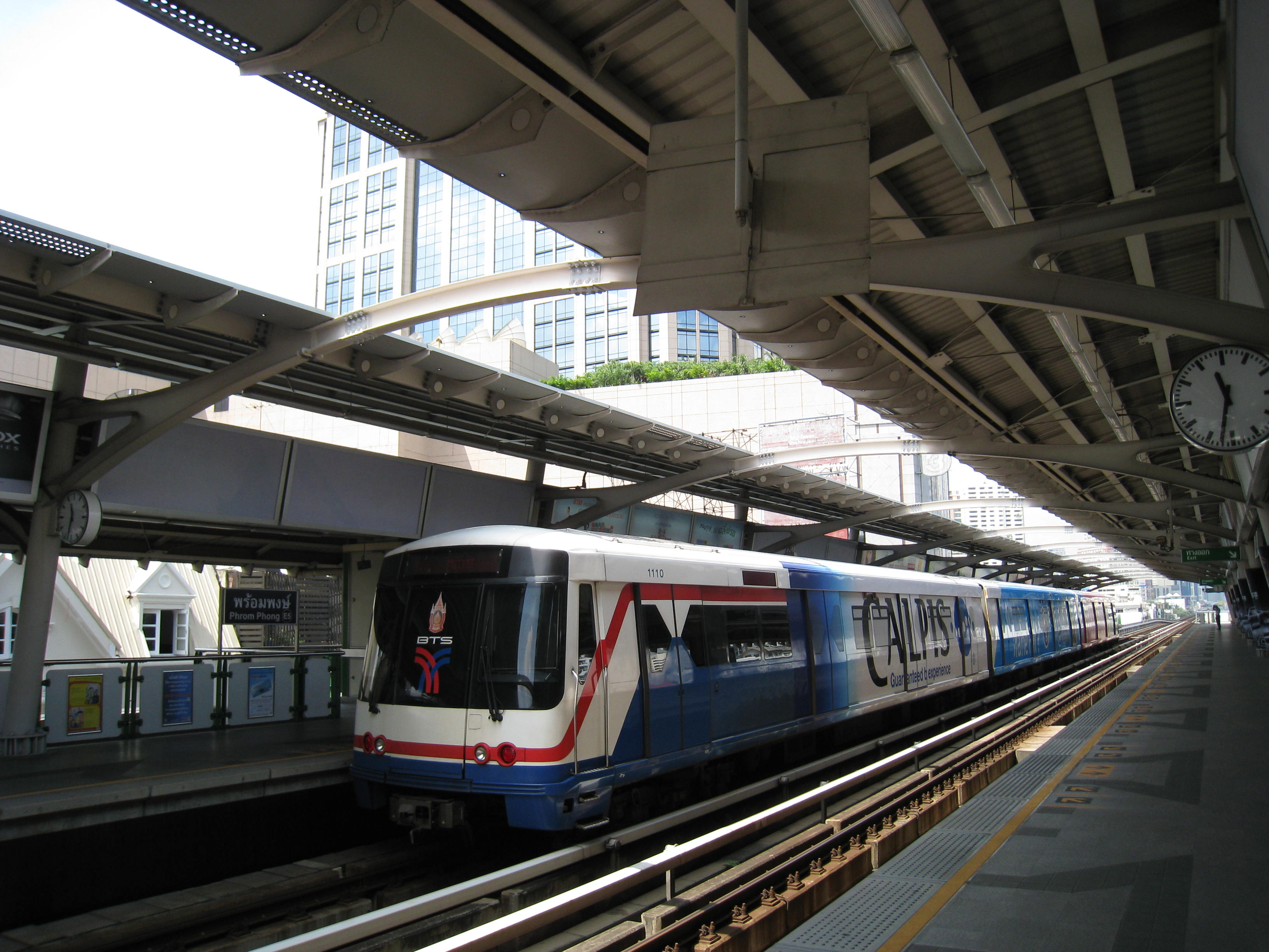 Bangkok Skytrain